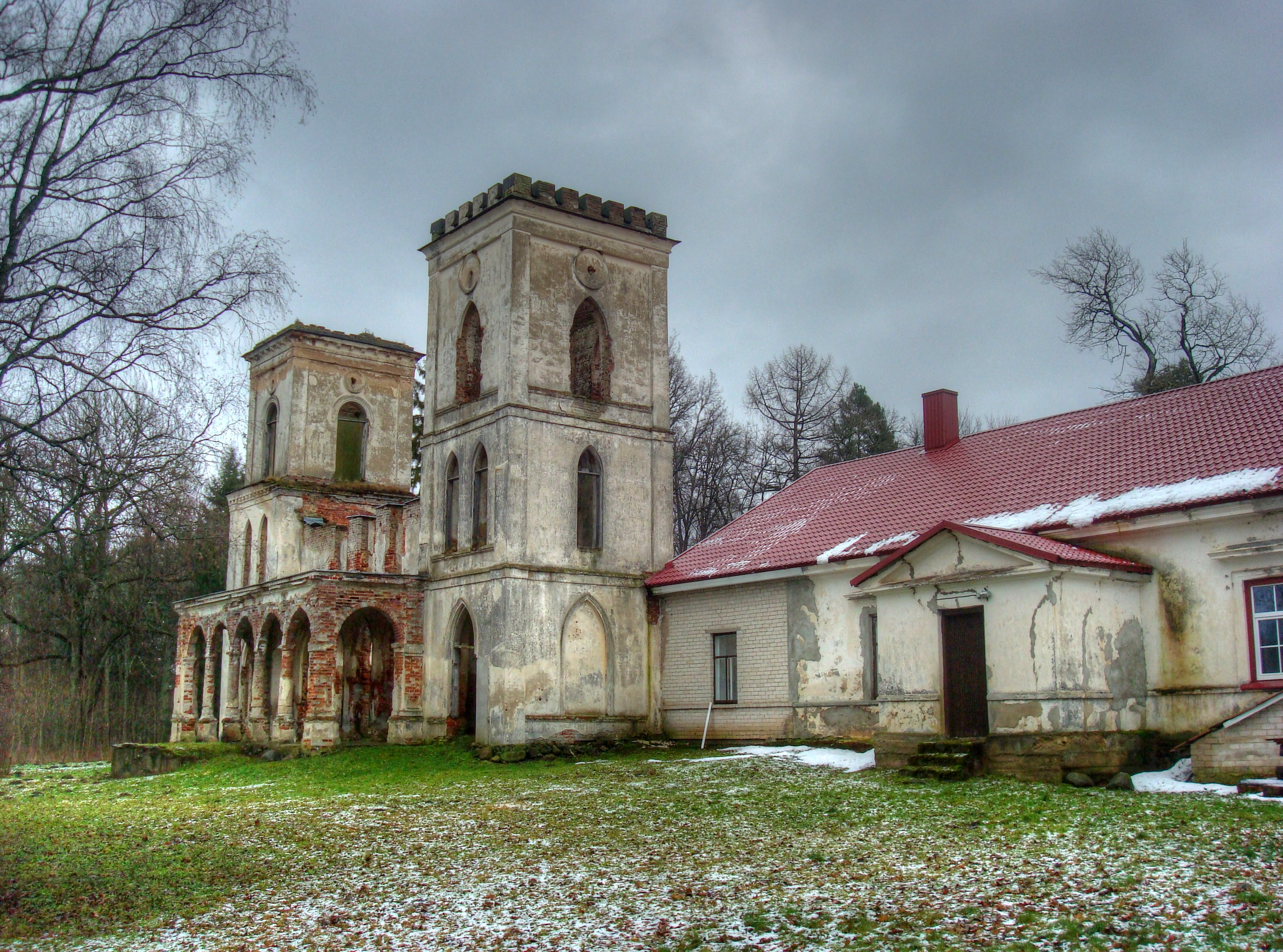 Palevenes (Komaru) dvaras /manor